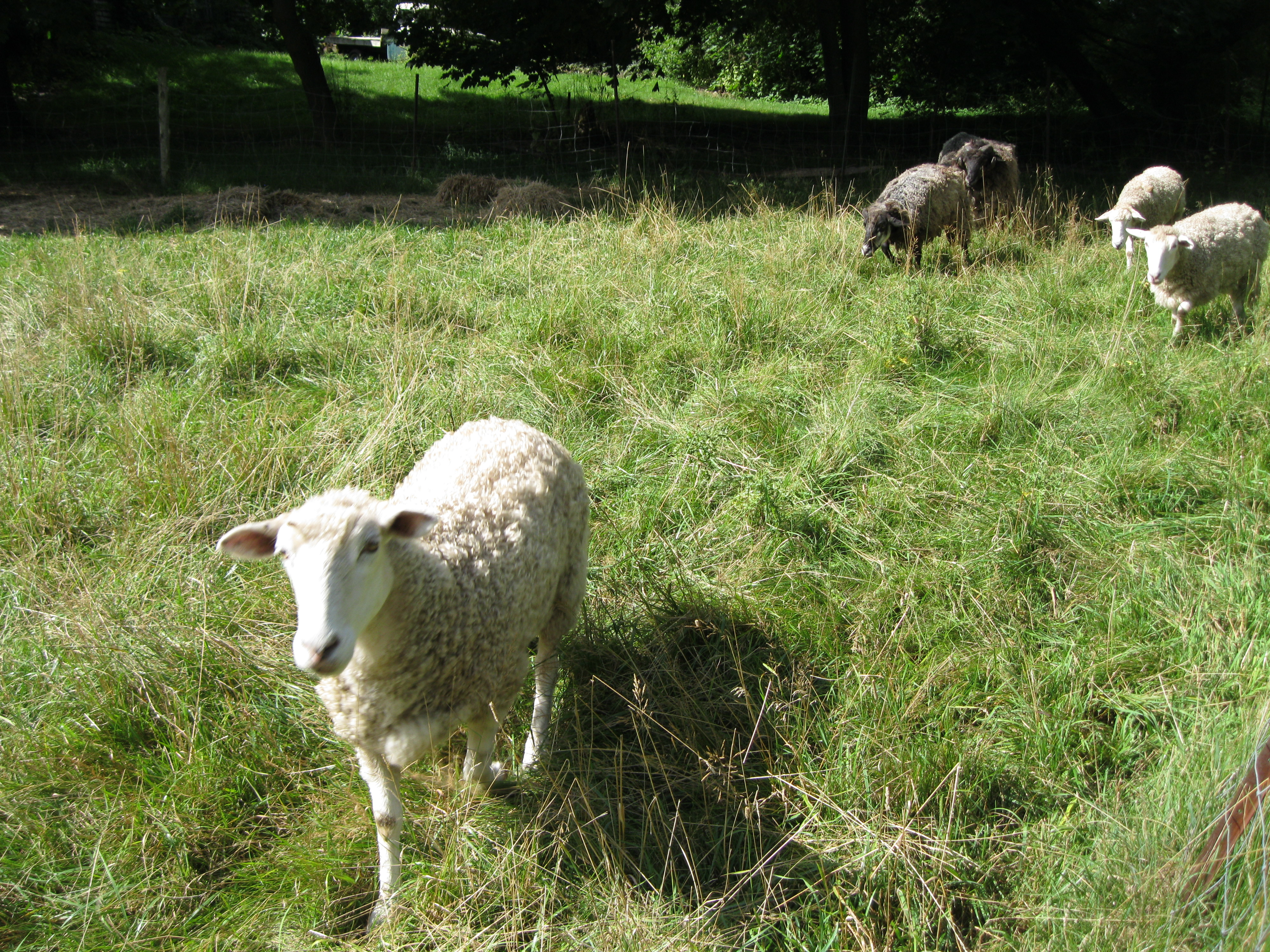 Le Parc agricole du Bois-de-la-Roche est une terre agricole appartenant à la Ville de Montréal. Elle fait partie du réseau des Grands Parcs de Montréal. On y trouve des bâtiments anciens. Grand répertoire du patrimoine bâti de Montréal : Grange-étable du domaine du Bois-de-la-Roche